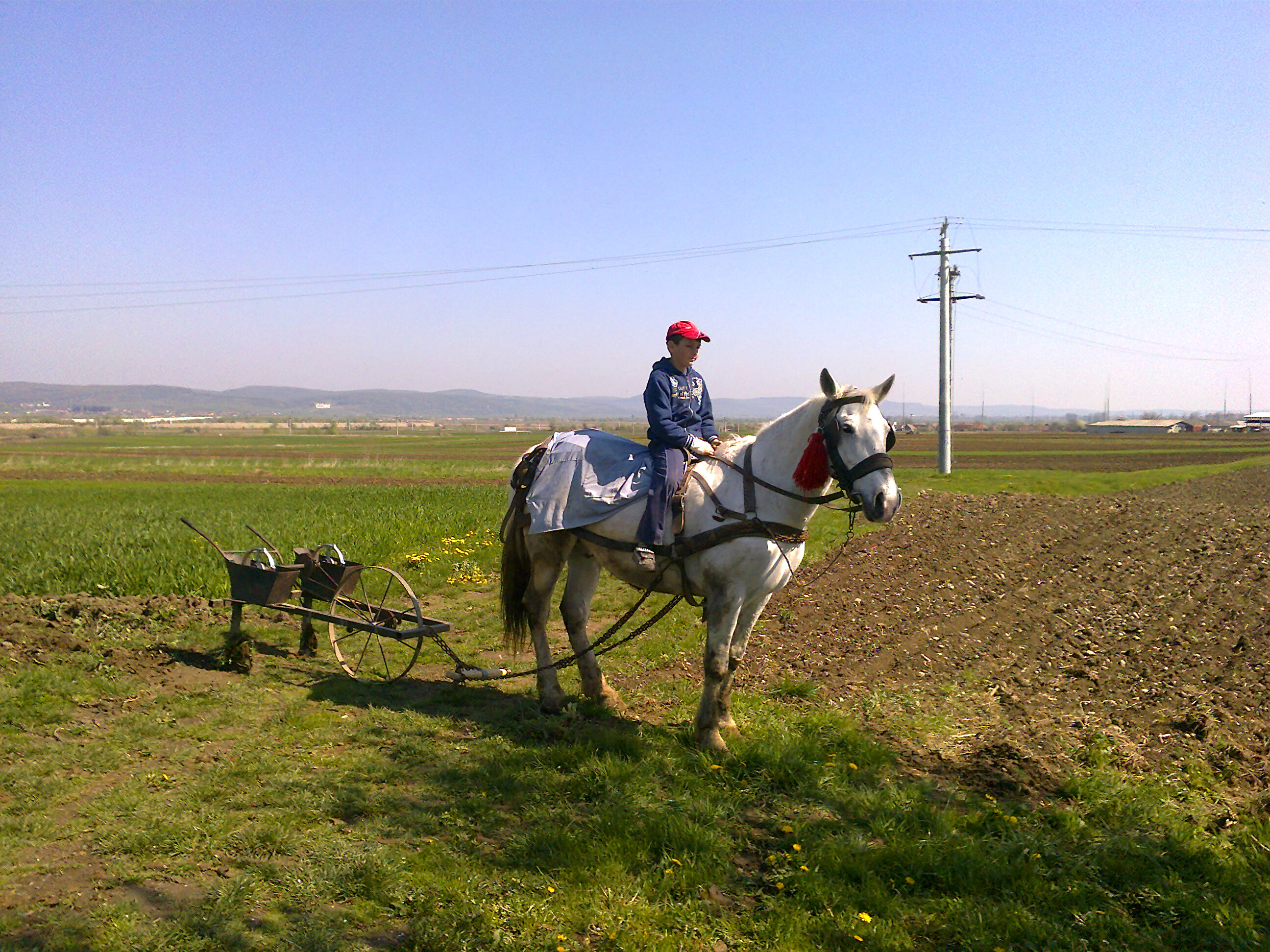 La semănat de porumb (cucuruz) în Mestecăniş - Racoviţa, Sibiu. Se poate observa "maşina" de semănat cu cupe tractată de cal. Ea este ţinută de mânere de către o persoană, în timp ce călăreţul conduce calul pe arătură.